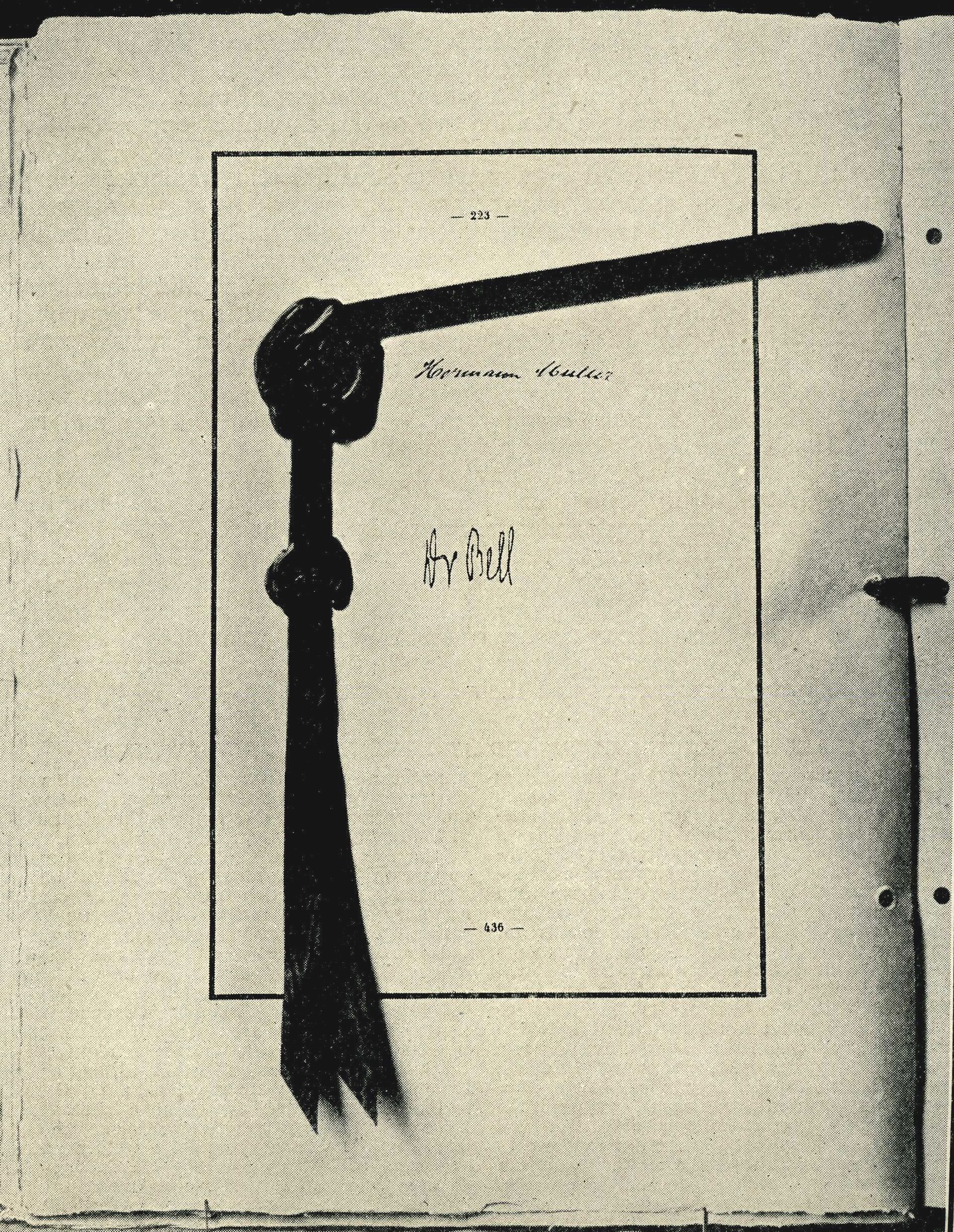 fac-simile des trois pages de signature du traité de Versailles